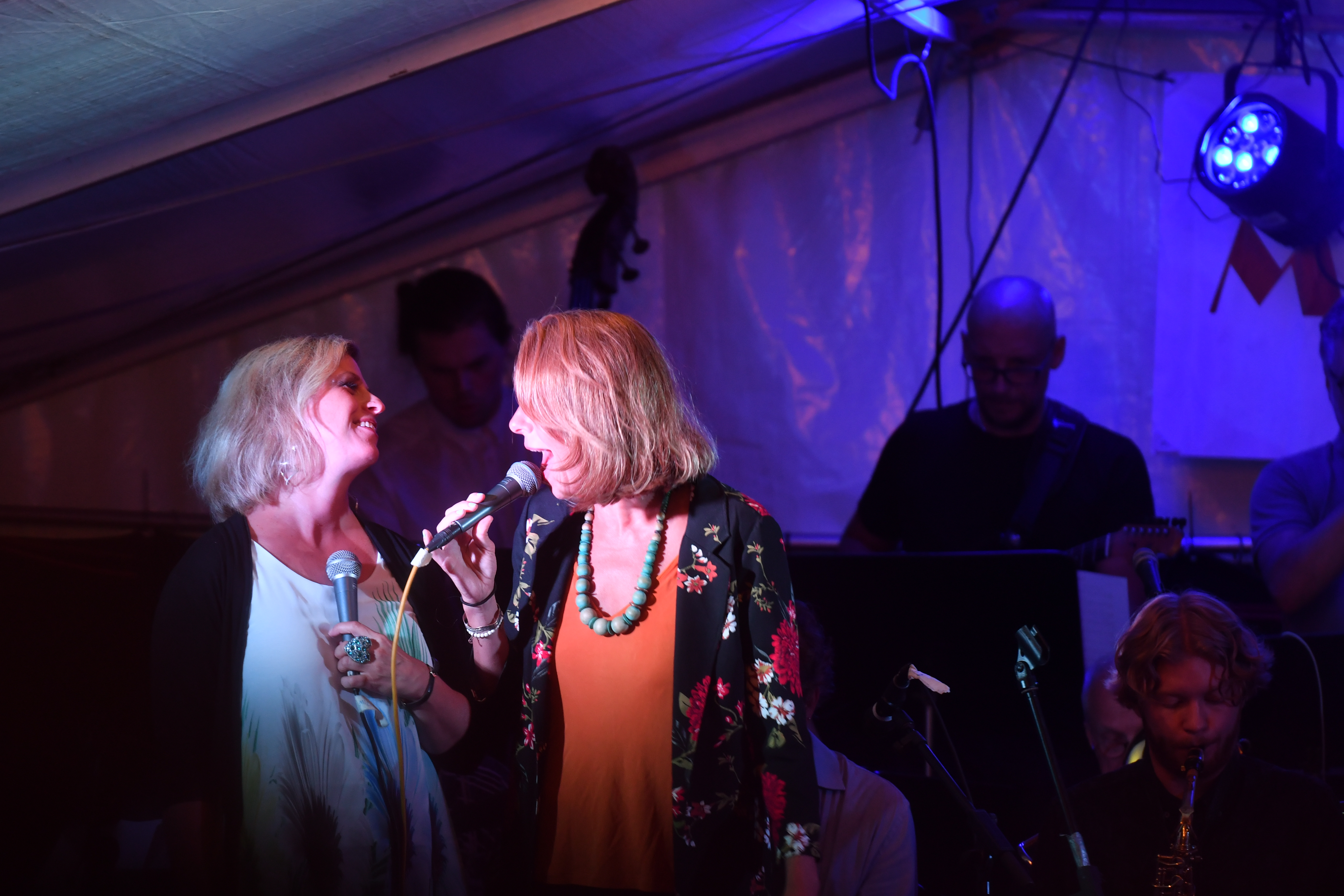 Vivian Buczek och Anna Pauline på Malmöfestivalen 2018.